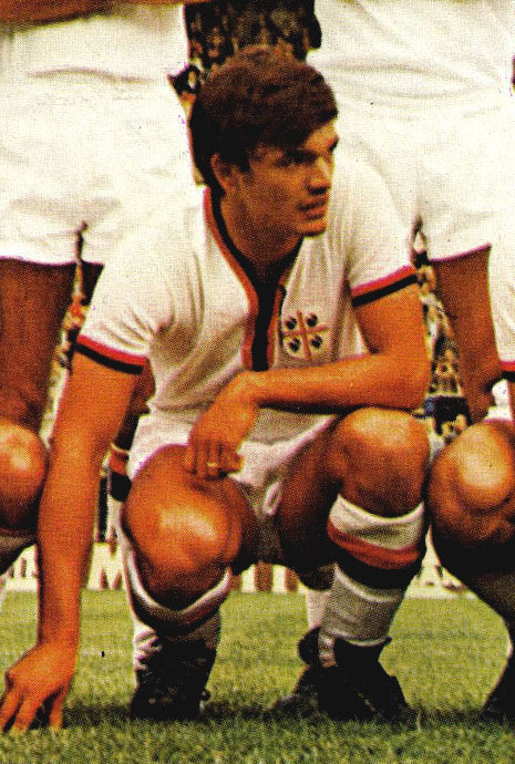 Il calciatore italiano Sergio "Bobo" Gori al Cagliari, in un'amichevole del precampionato 1969-70 allo stadio San Siro di Milano contro l'Inter.